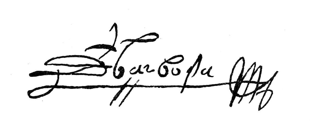 Signatura de Duarte Barbosa